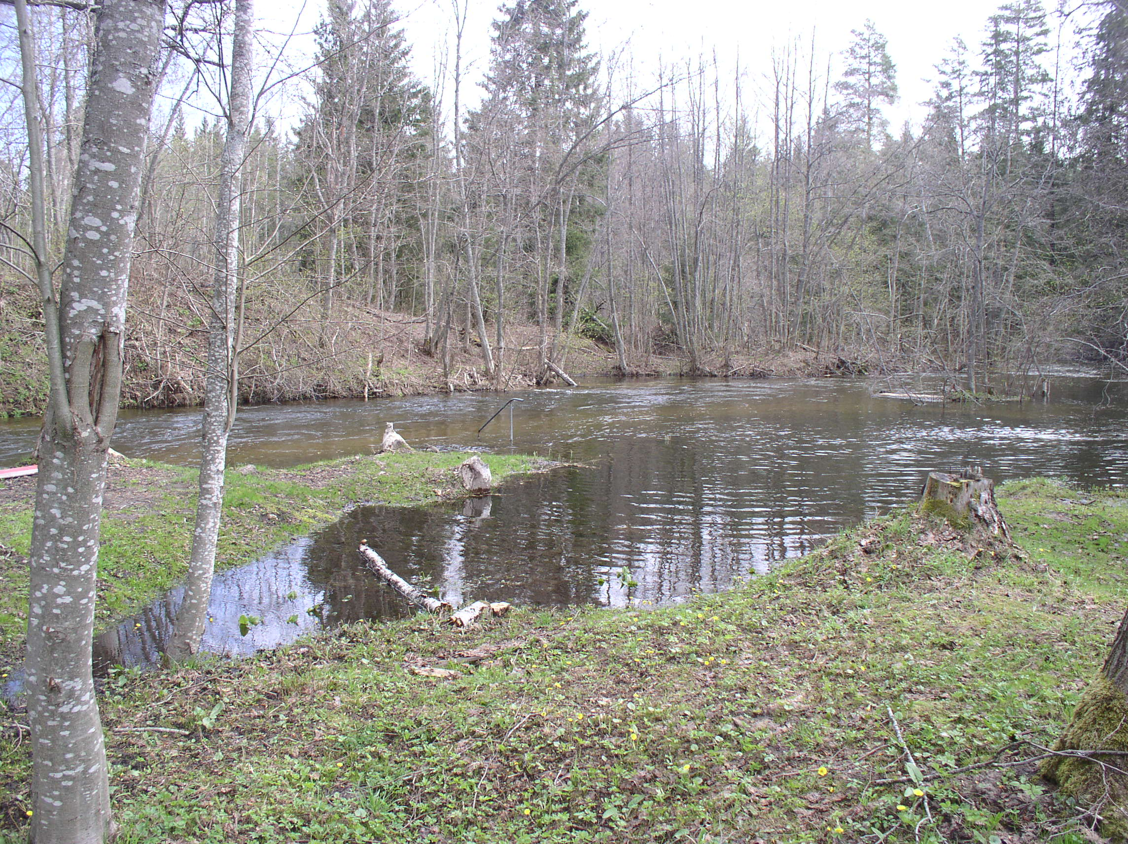 Река Валдайка, май 2011, хорошо виден пень от сваленого бобрами дерева